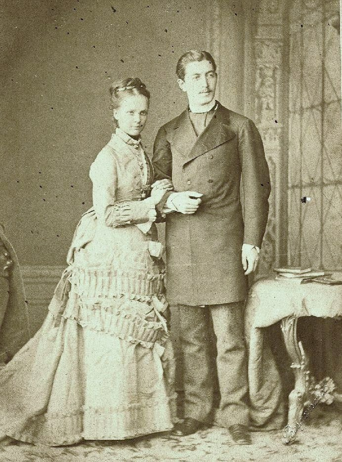 Князь Борис Борисович Мещерский с женой Марией Алексеевной, ур. Мусиной-Пушкиной